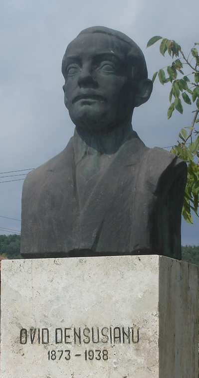 Ovid Densusianu bust, Densuş, Hunedoara, Romania